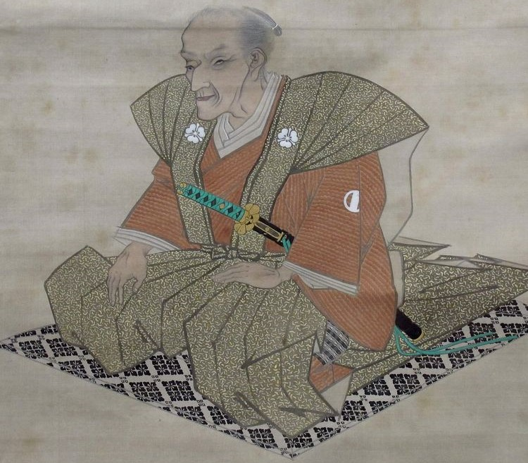 酒井忠道の肖像。